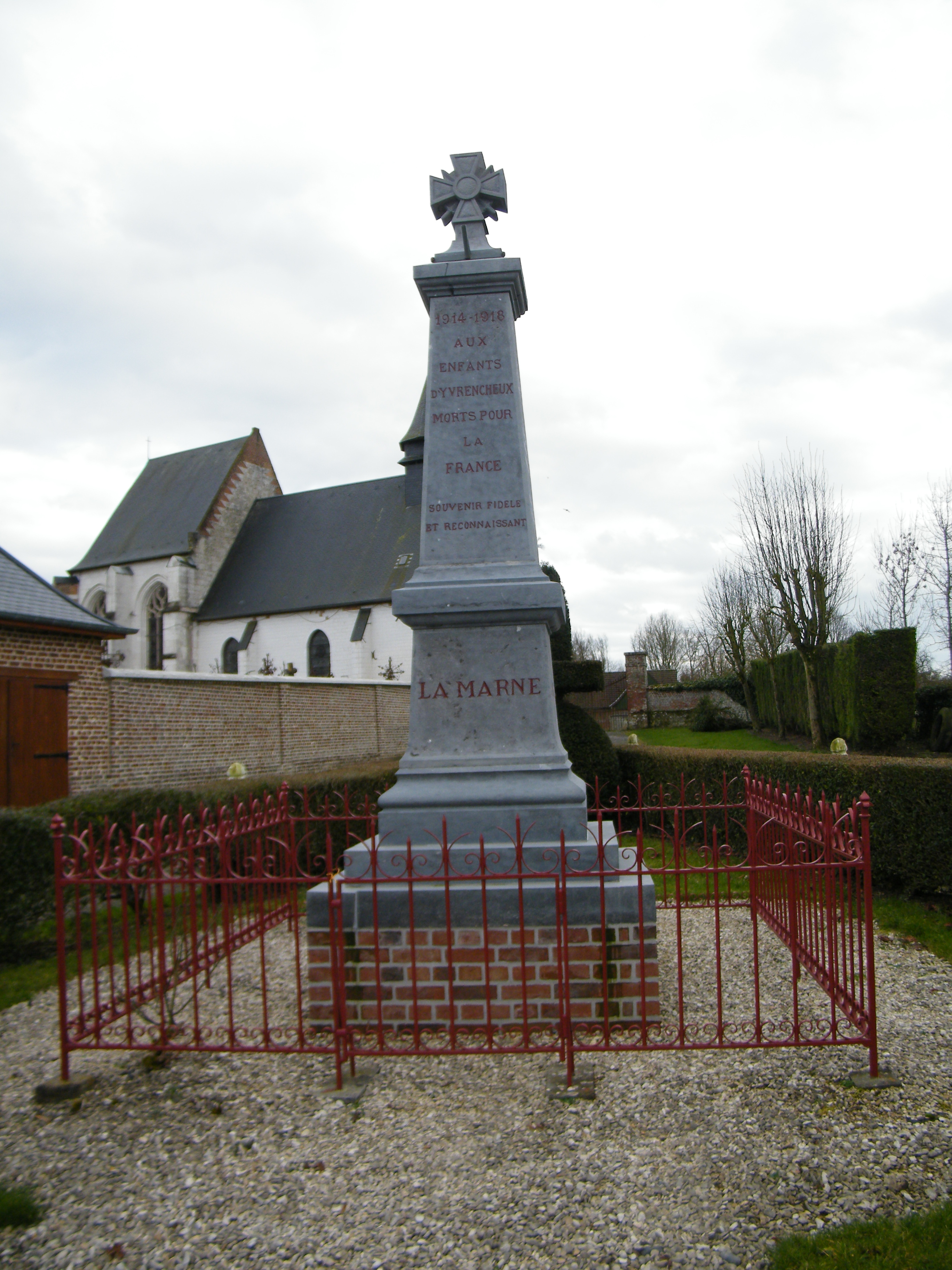 monument